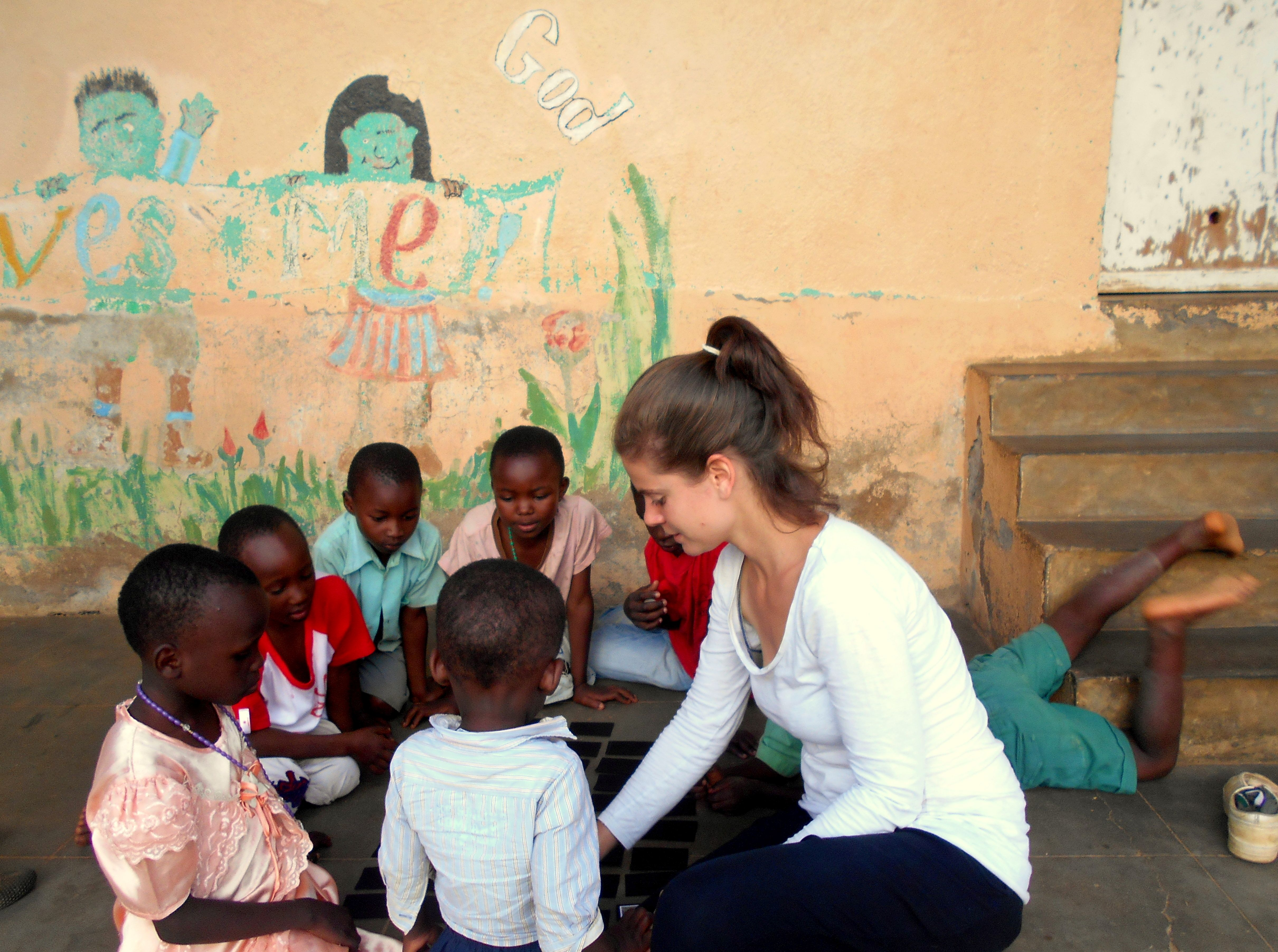 A Taita Alapítvány önkéntese a Szent József Gyermekotthonban, Kenya